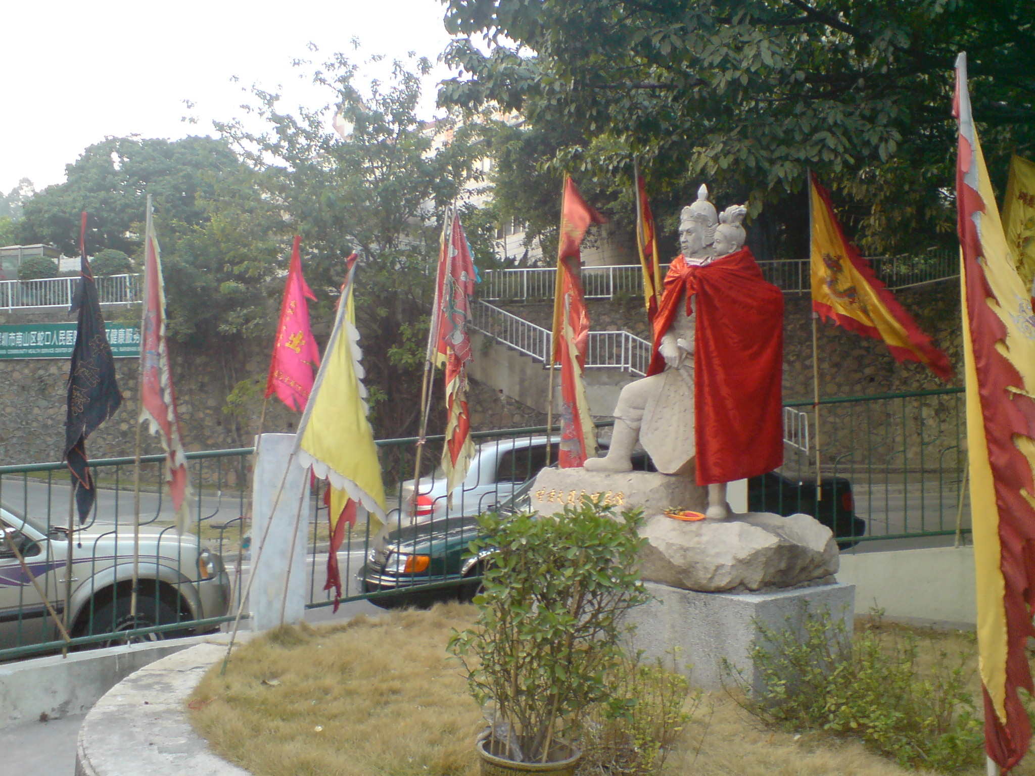 中文（中国大陆）: 陸秀夫與宋少帝